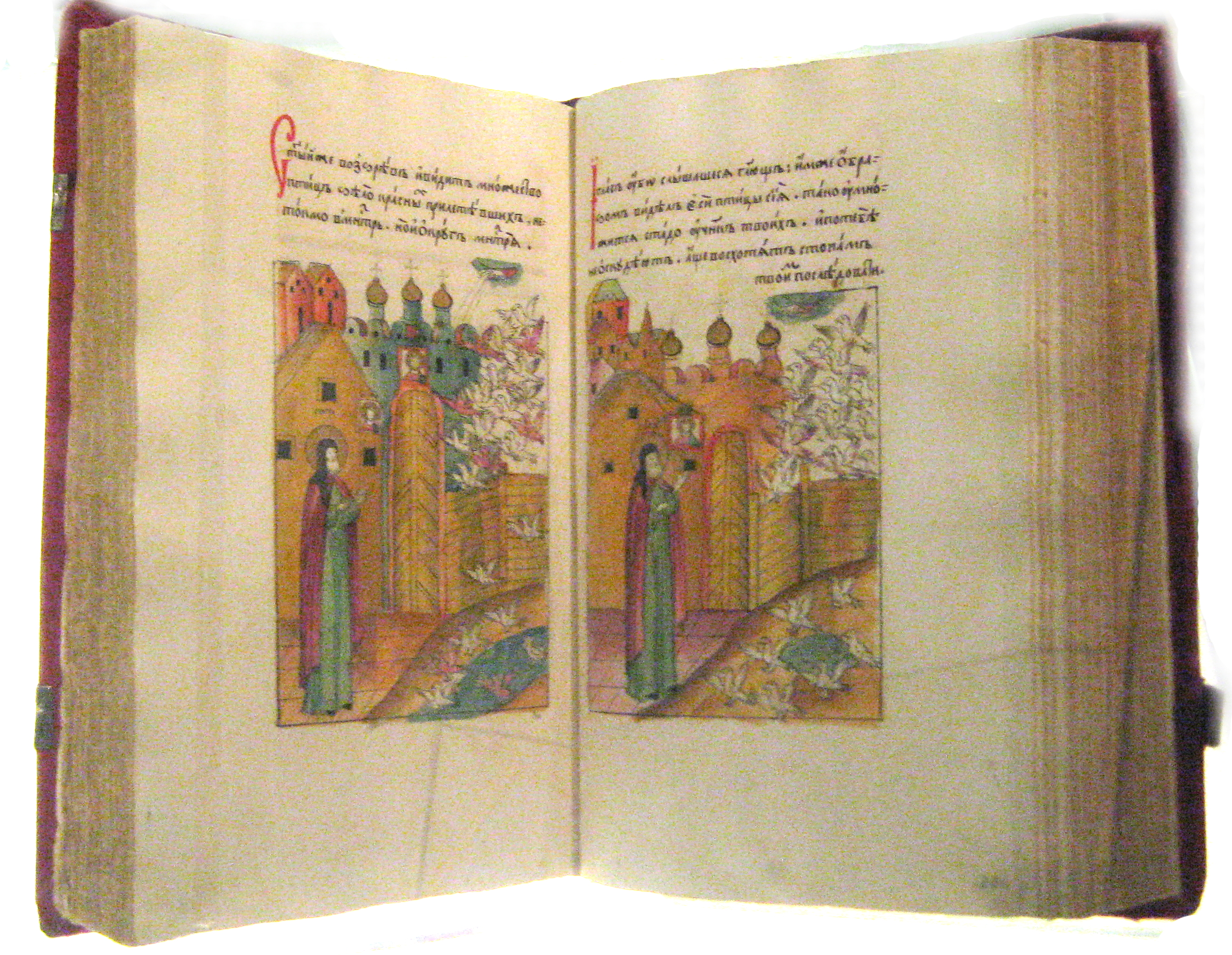 ЖИТИЕ ПРЕПОДОБНОГО СЕРГИЯ РАДОНЕЖСКОГО Конец XVII века 445 л. Бумага; чернила, темпера, золото 31 х 21 Поступило в 1728 году Принадлежало царевне Наталье Алексеевне БРАН инв. П I A 38